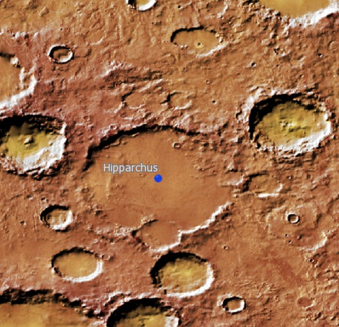 Cráter marciano Hipparchus. (Imagen IAU/USGS/Goddard/A SU/USGS)